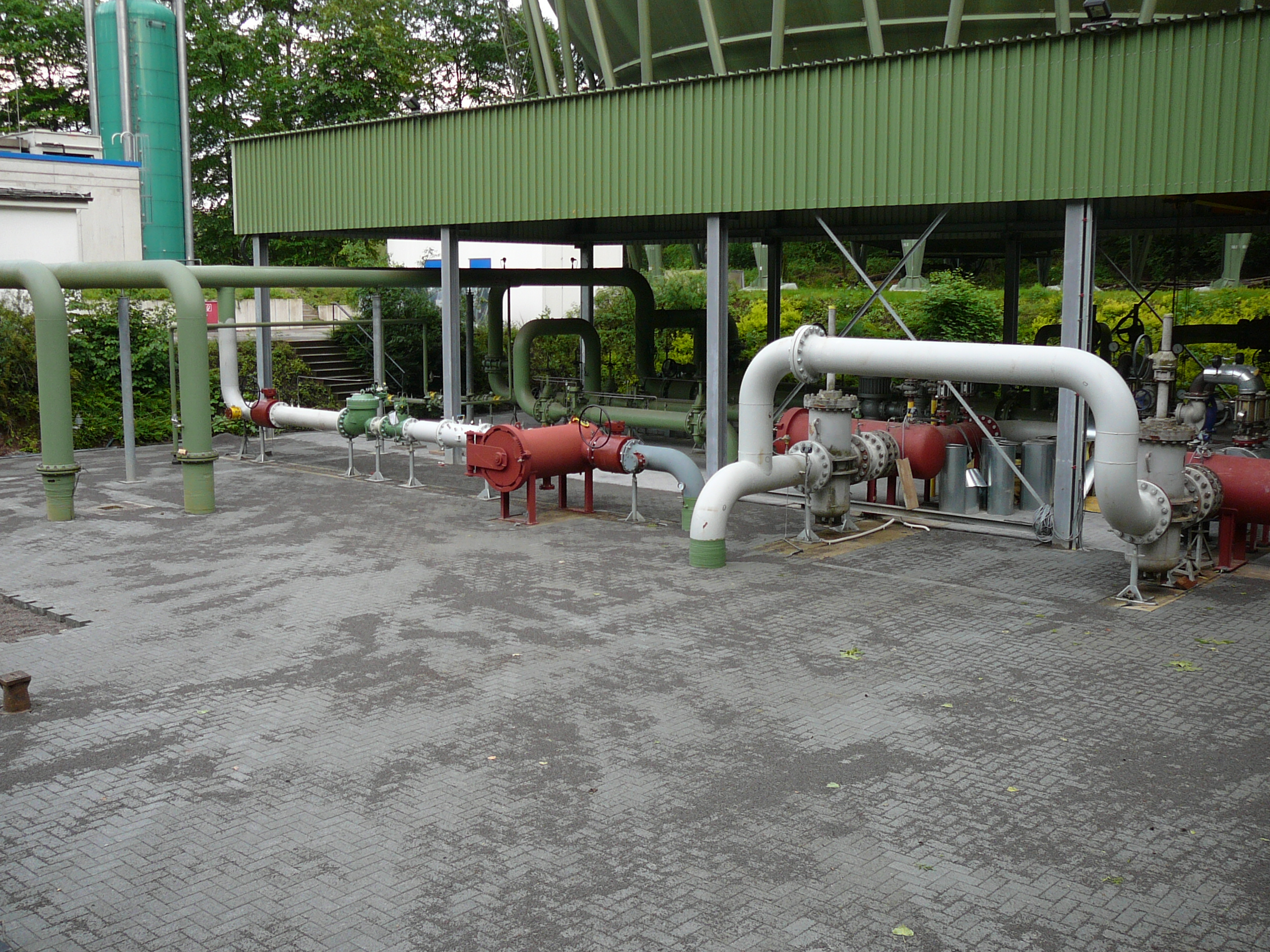 Kugelgasbehälter im Gewerbegebiet Industriestr., Wuppertal